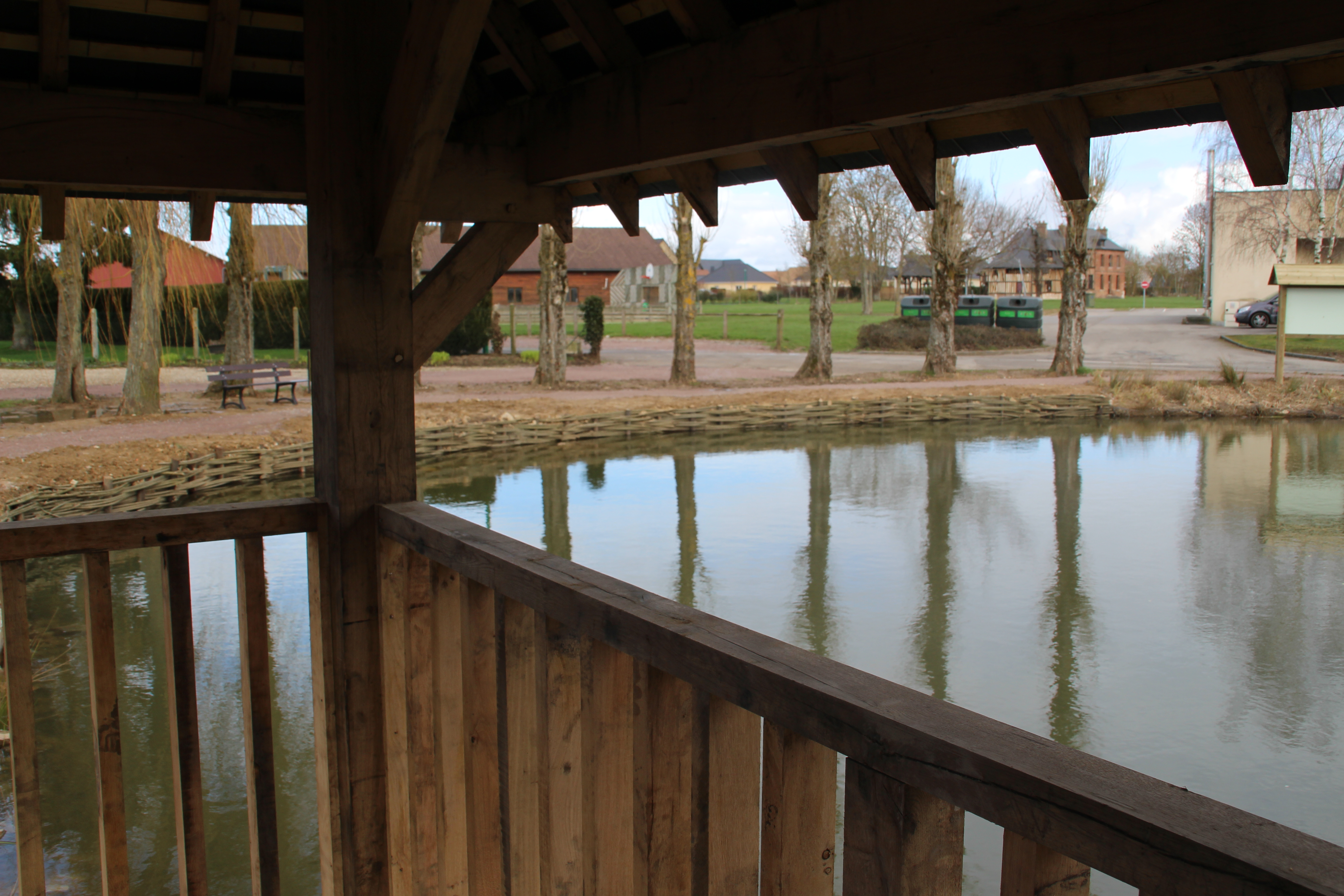 La mare